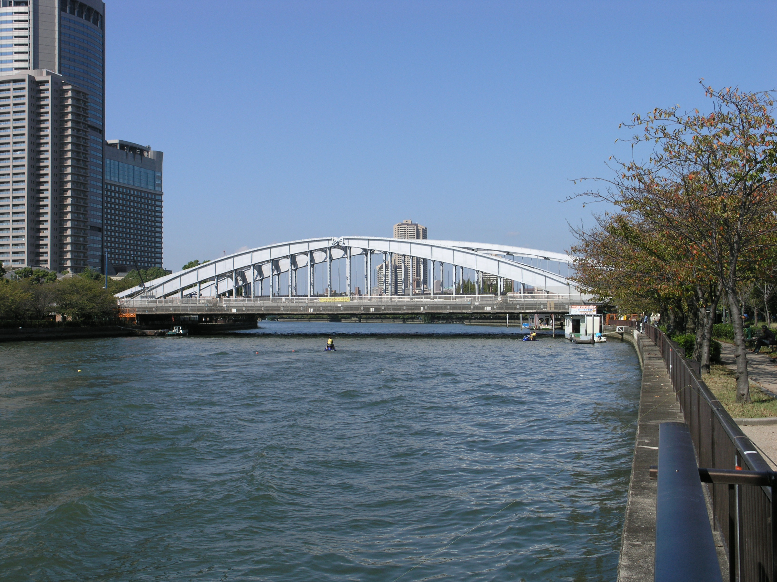 桜宮橋（大阪市北区-都島区） 2008年10月撮影。 機材：C8080WZ 撮影者：Kansai explorer